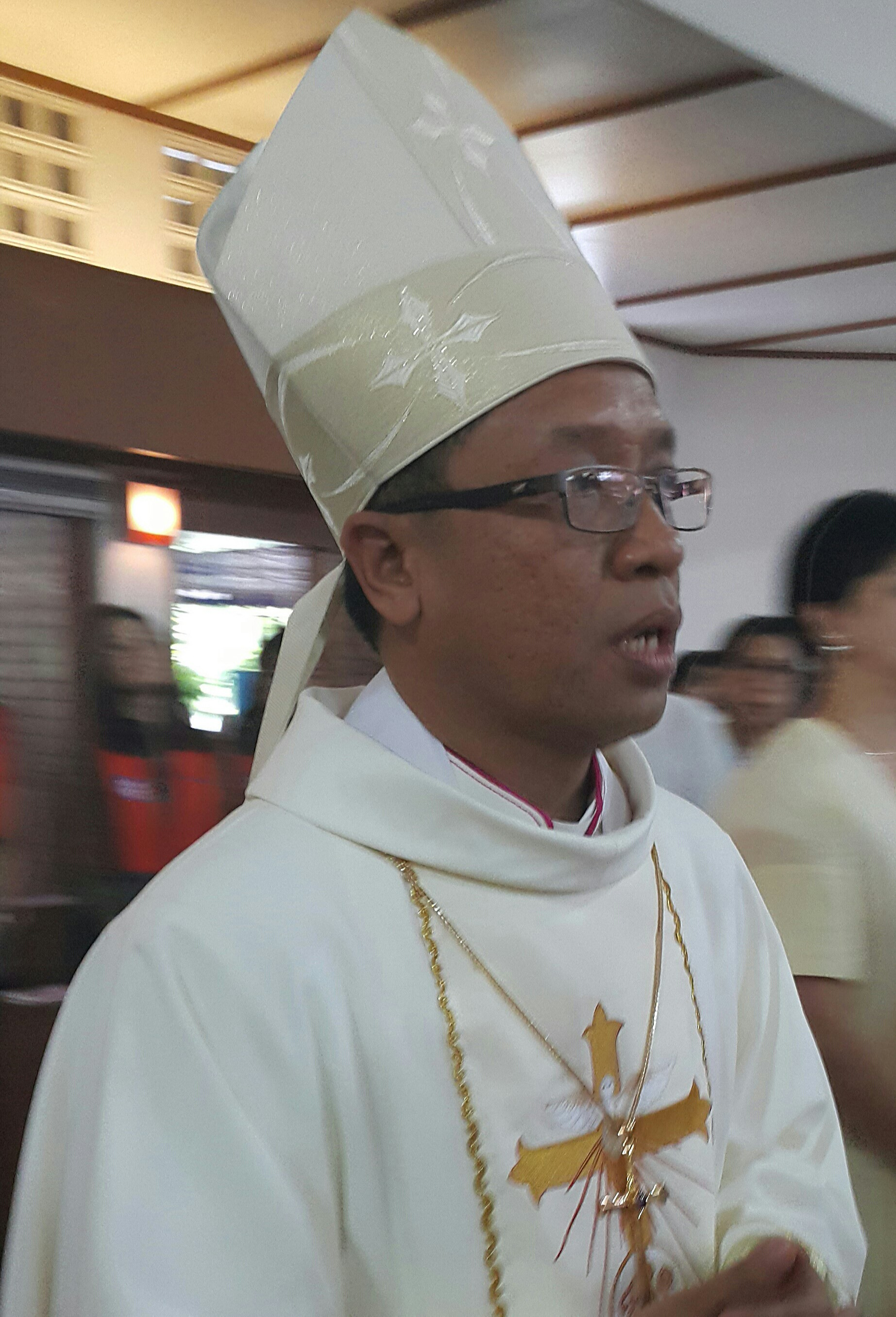 Mgr. Adrianus Sunarko, Uskup Pangkalpinang